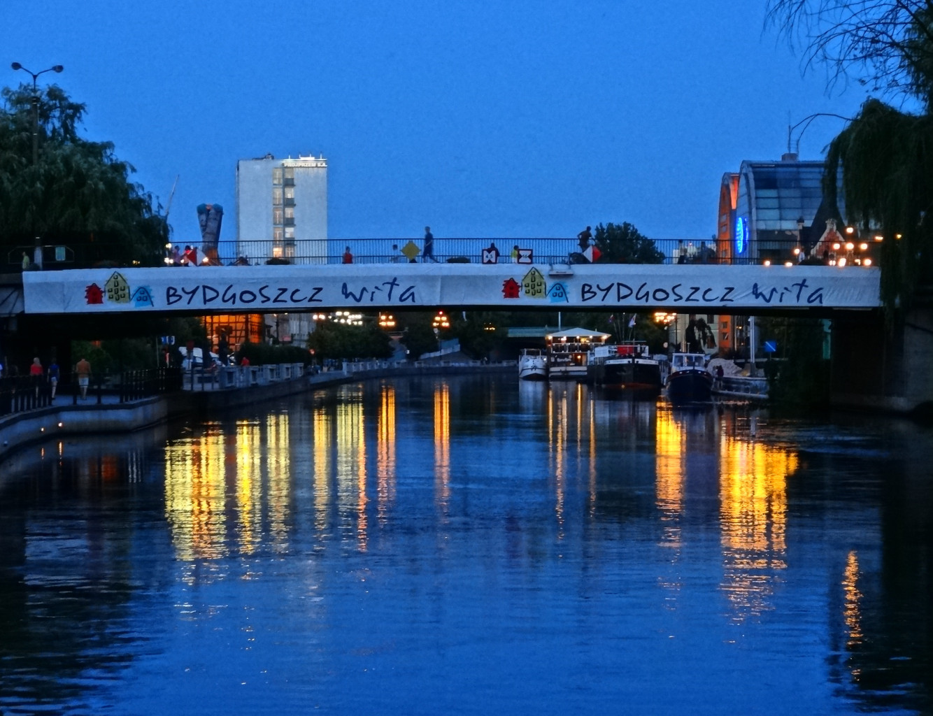 Most Staromiejski im. Jerzego Sulimy-Kamińskiego nad Brdą w Bydgoszczy